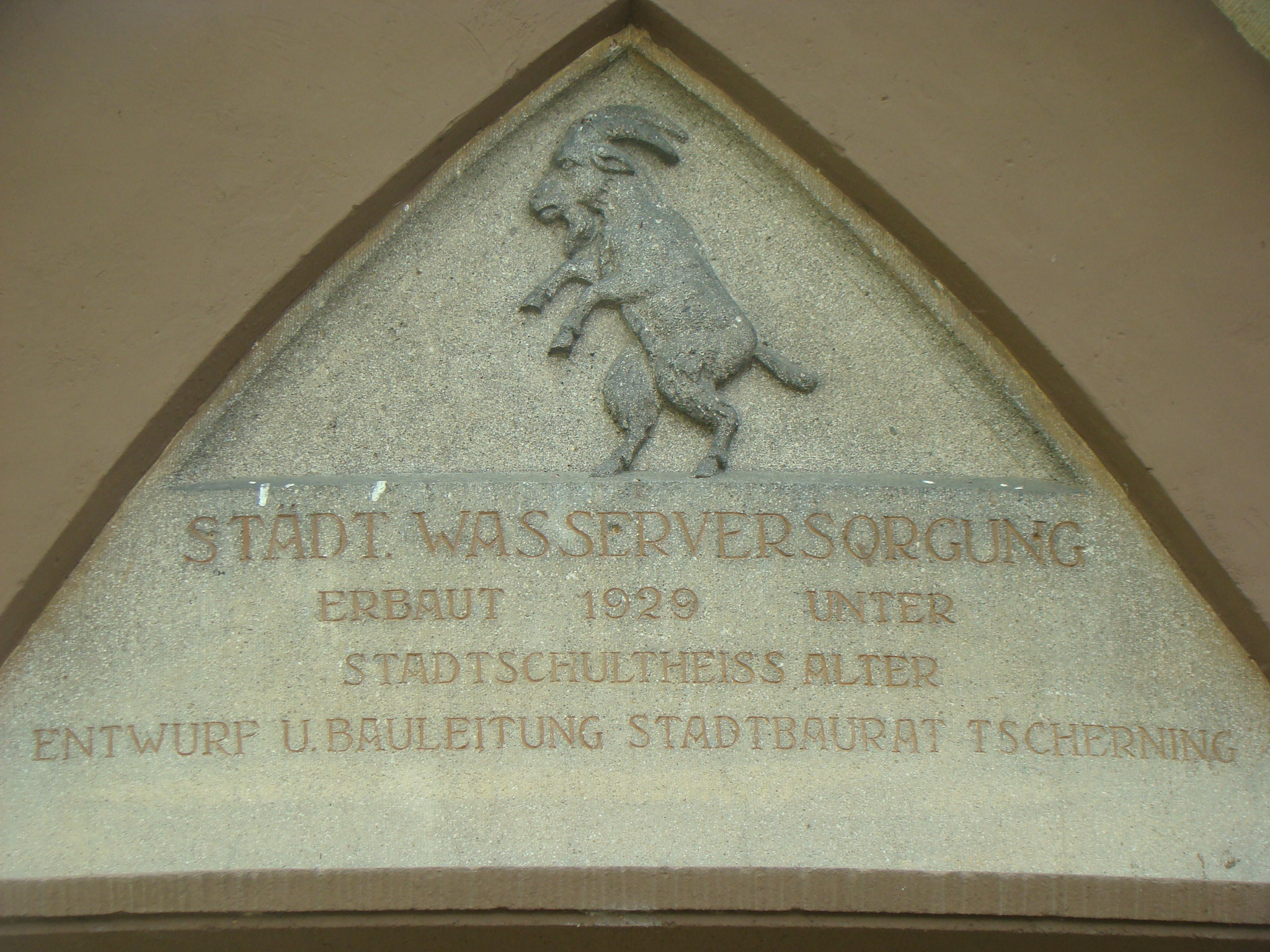 Heilbronn-Böckingen, Wasserturm